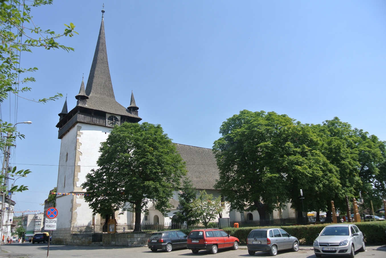 Kostel reformované církve v Huedinu